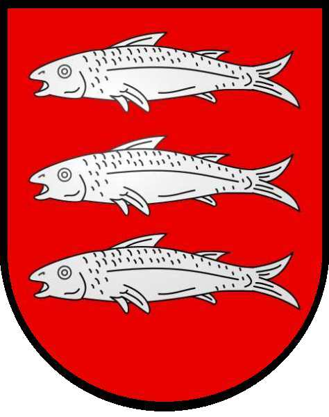 Familienwappen Schauenstein (von)Blasonierung: In Rot übereinander drei silberne Fische.